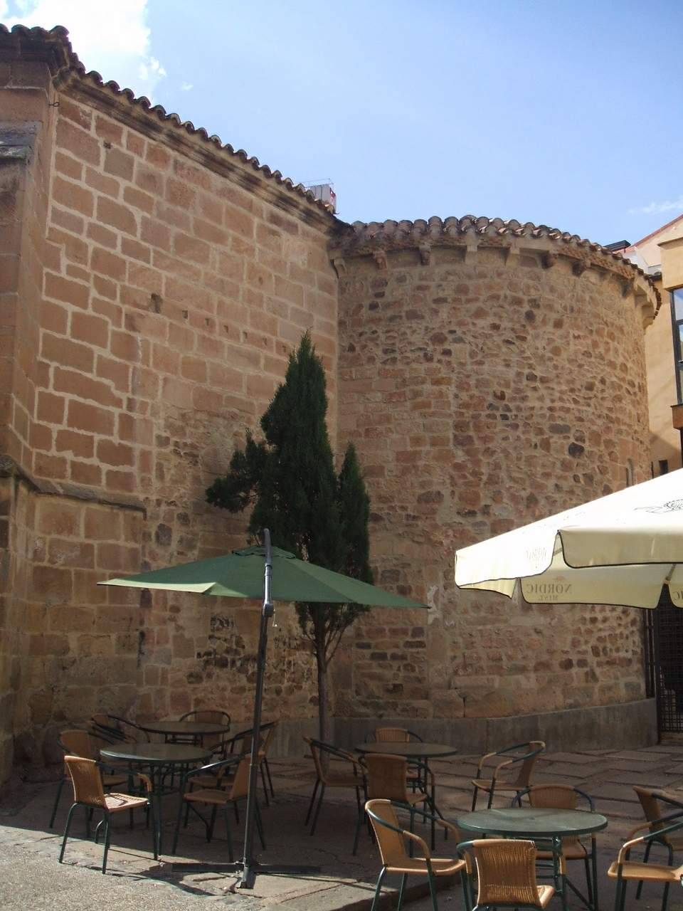 Iglesia del Salvador, en Soria